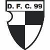 Wappen des Düsseldorfer FC 99 (heute Düsseldorfer SC 99)